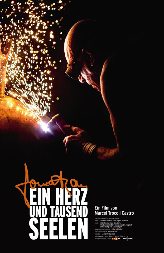 Filmplakat zur Dokumentation "Jonathan - Ein Herz und tausend Seelen"